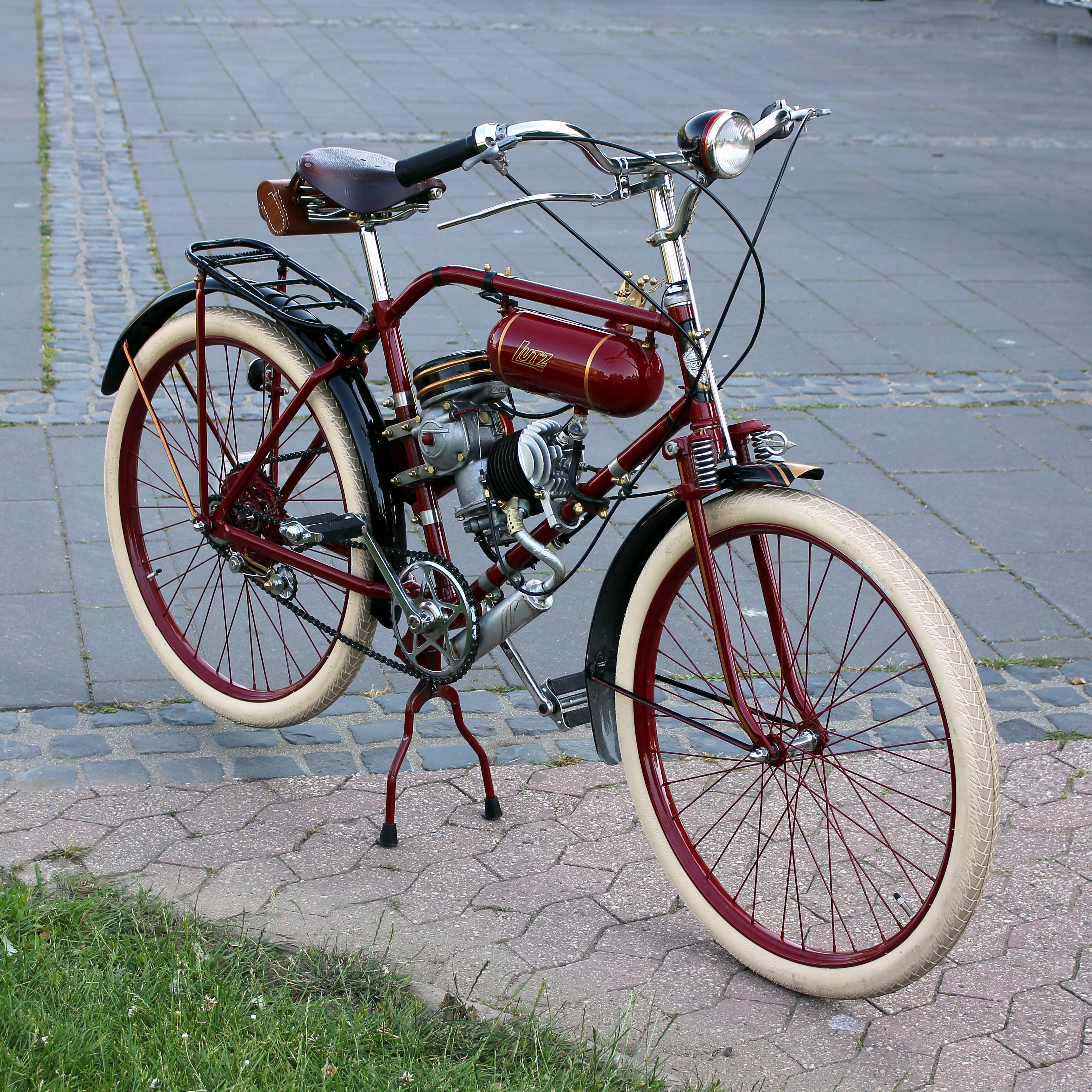 Goebel-Fahrrad mit Lutz-Motor, Typ 58/50, 49,3 cm³, 1 PS; Baujahr 1952 (Angaben laut Typenschild)